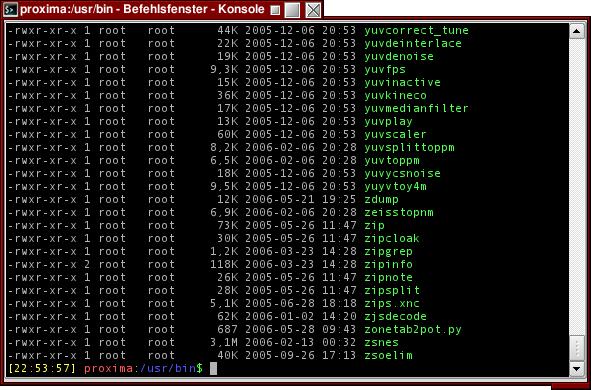 Konsole in Kubuntu Dapper, Window-Style BII, Widget-Style Lipstik, bash-command-line-interpret, ausgeführter Befehl ls -lh in /usr/bin